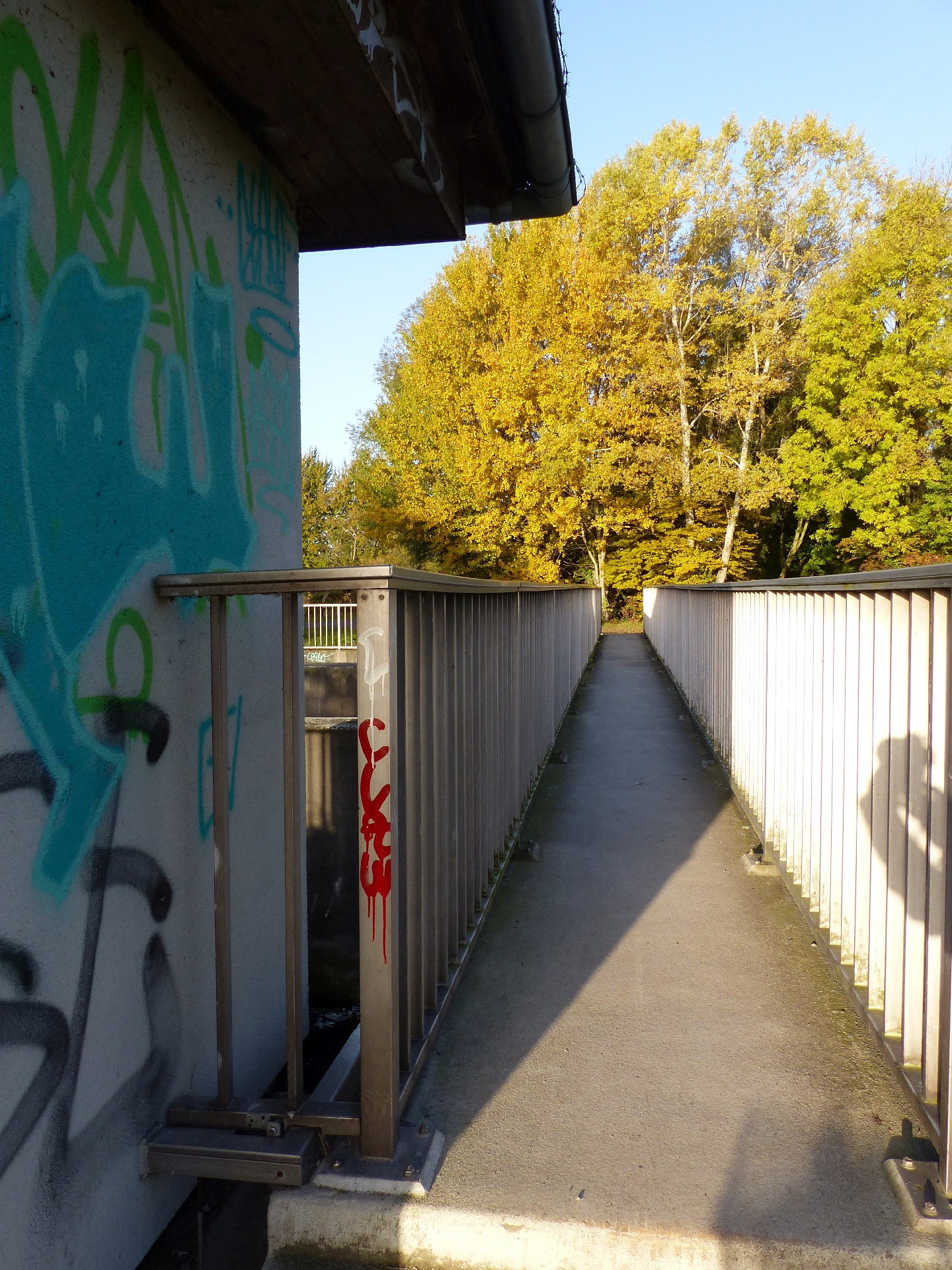 Übergang für Fußgänger über das Rüninger Wehr.